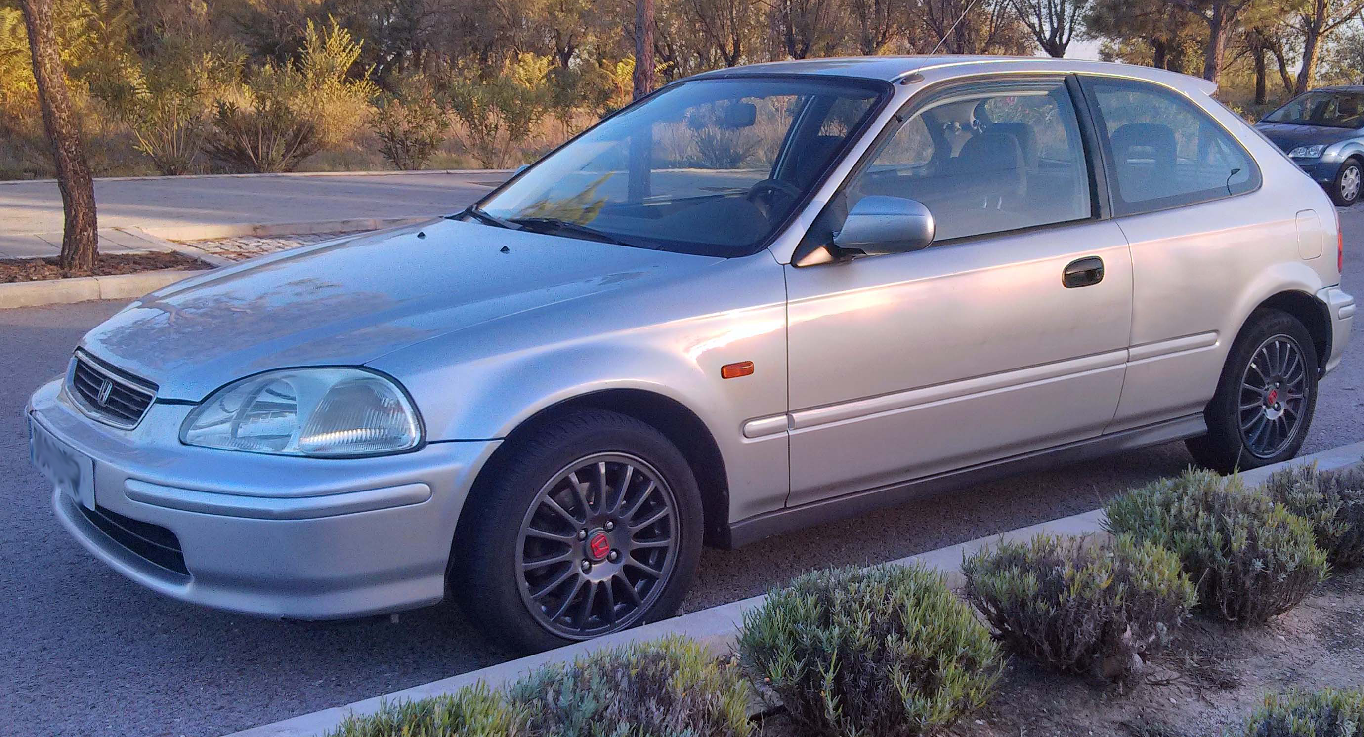 Honda Civic EK3 Pre-reestyling